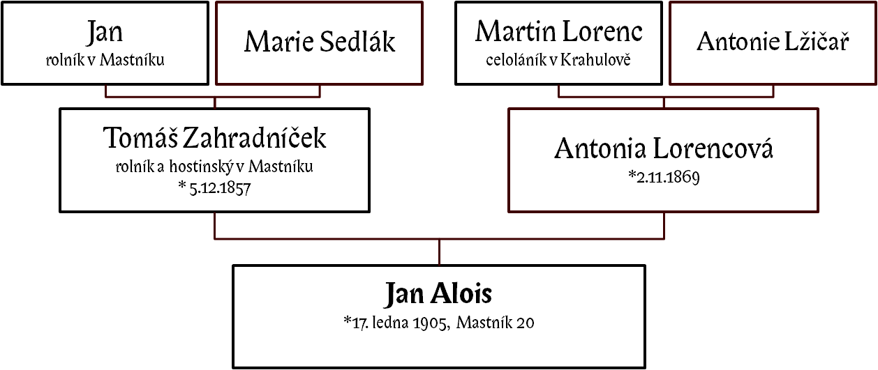 Rodová linie dvou generací předků Jana Aloise Zahradníčka